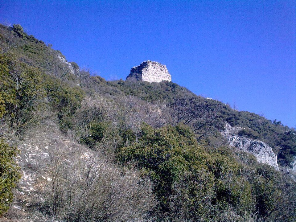 Isar Kale, Valandovo